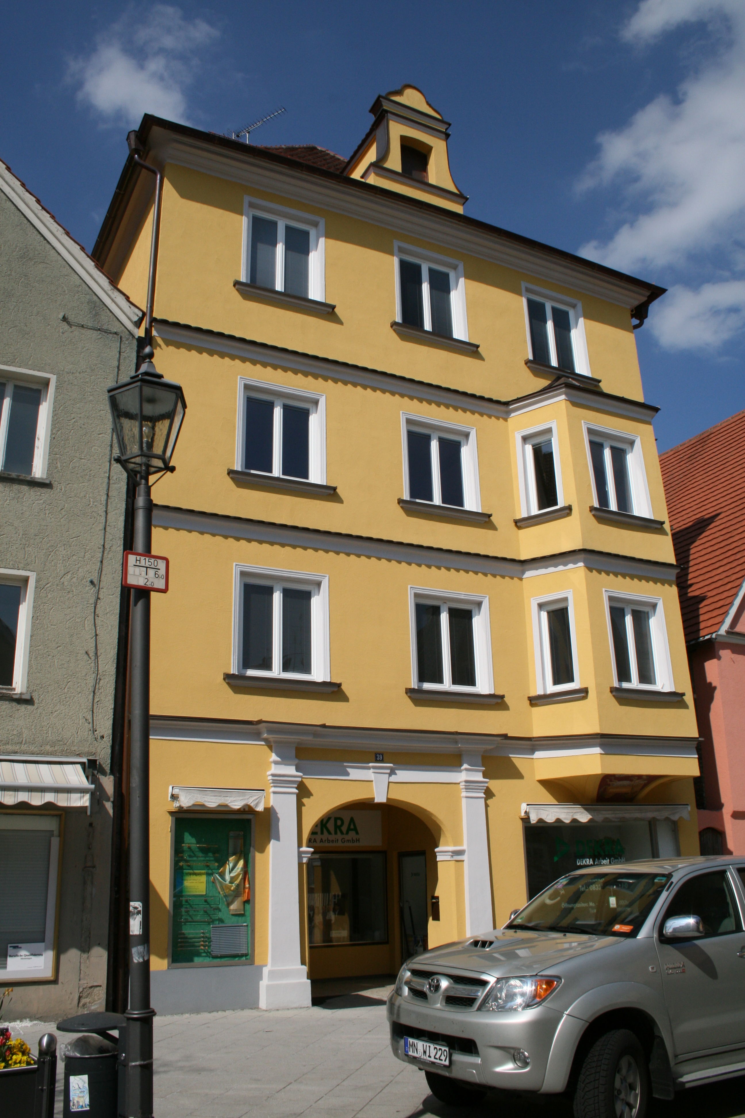 Hausfassade in der Kalchstraße im oberschwäbischen Memmingen